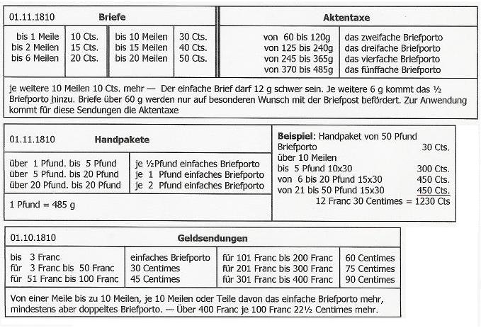 Posttarife im Königreich Westfalen zum 01.10.1810